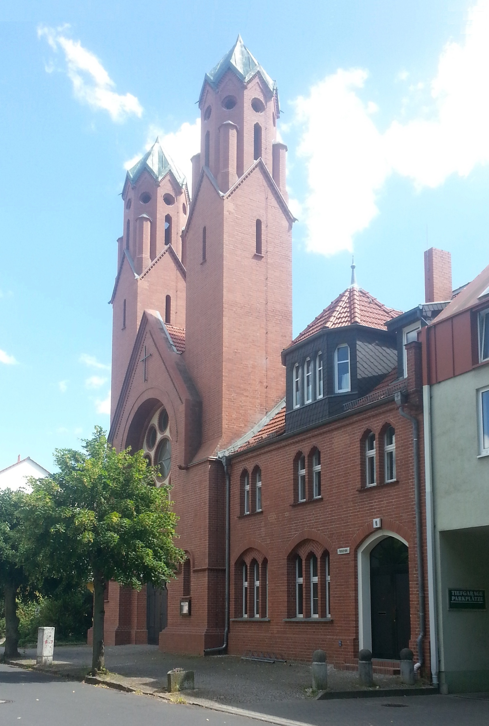 Trebbin, kath. Kirche St. Joseph